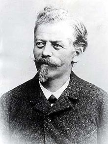 菲利普·约翰·海因里希·福特